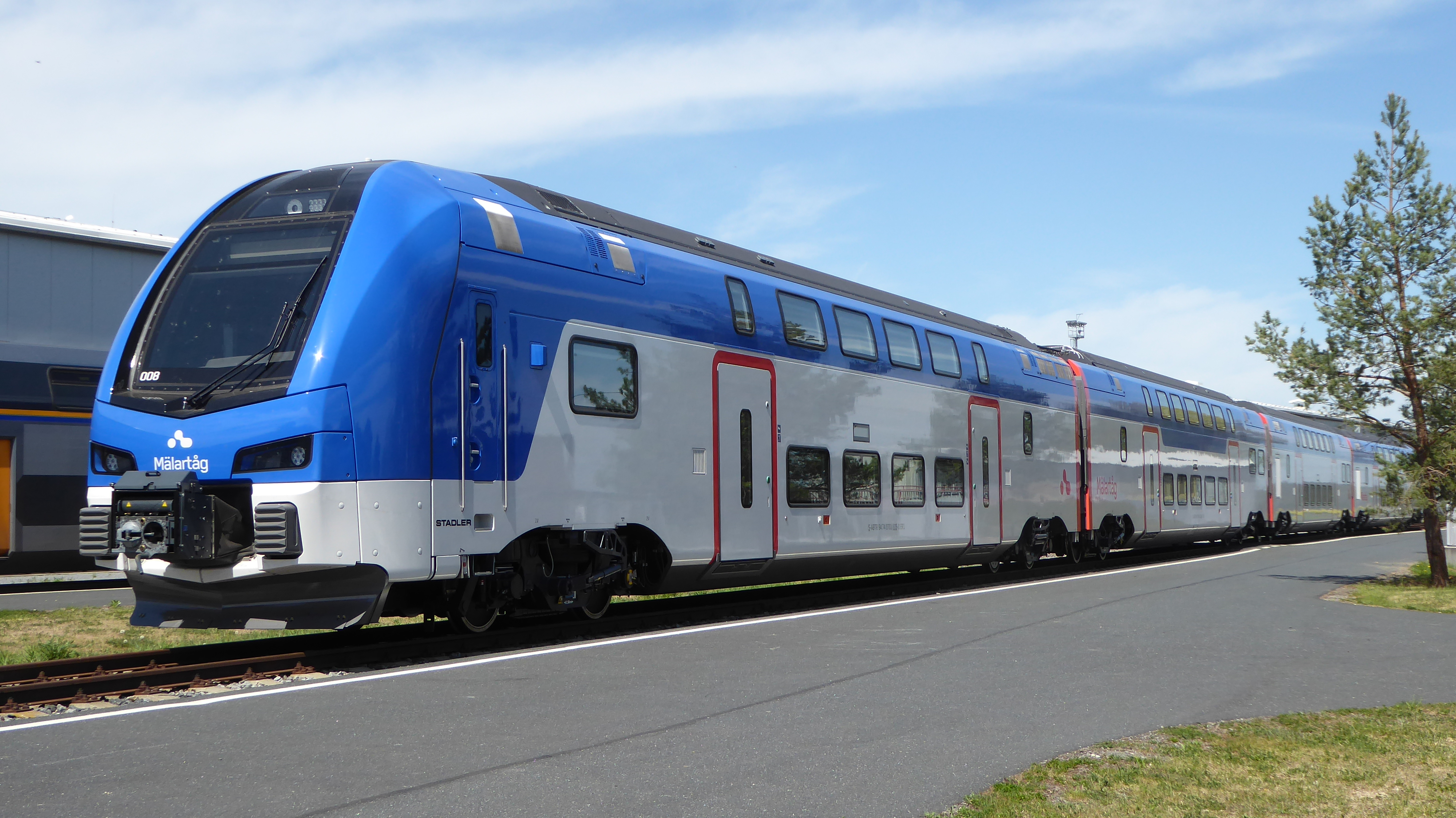 Stadler KISS des schwedischen Verkehrsunternehmens Mälardalstrafik (ABTR) 94 74 0701 608-0 auf dem Eisenbahnversuchsring in Velim (CZ)